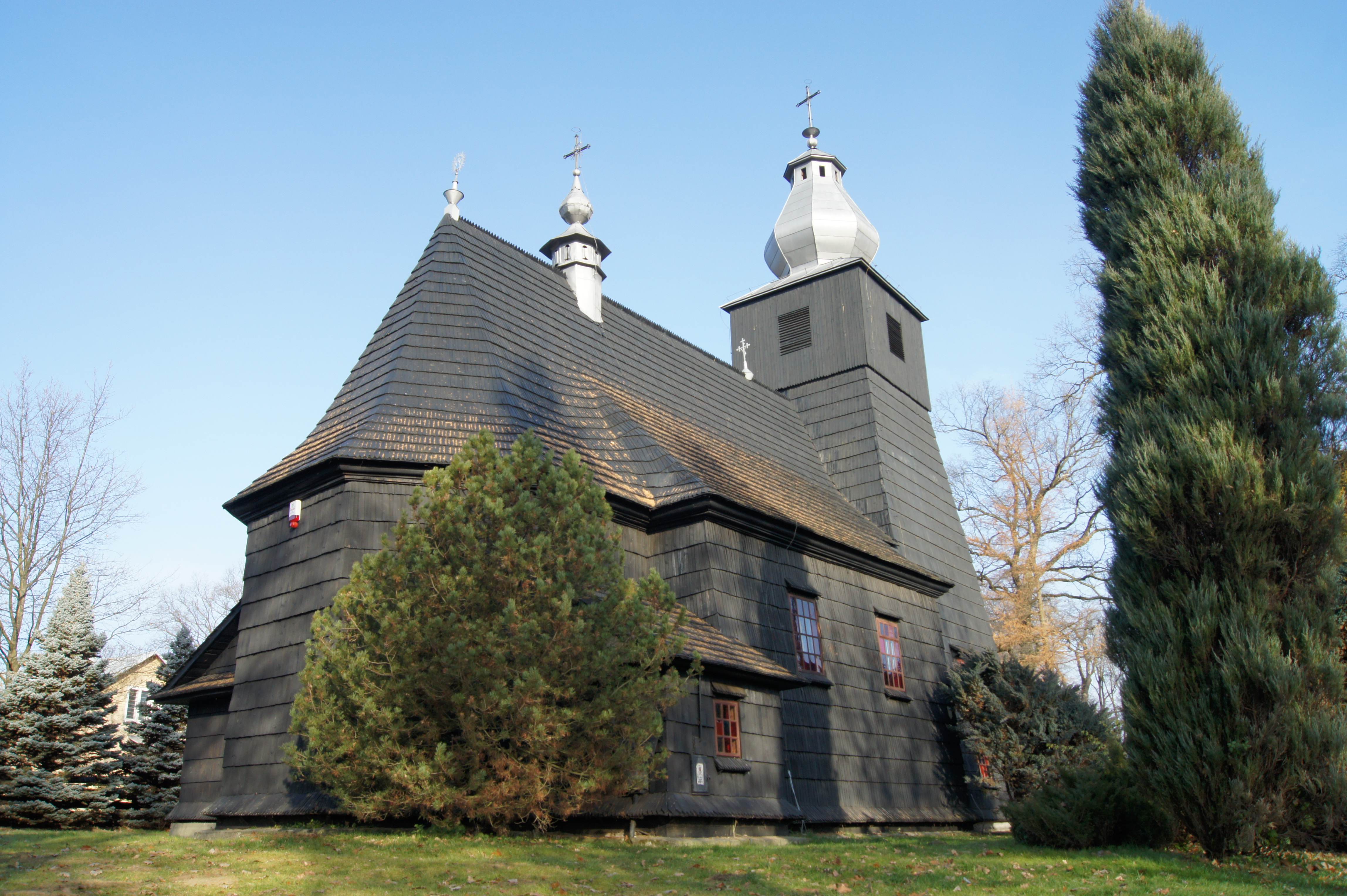 Kościół Parafialny w Średniej Wsi wzniesiony został w II połowie XVI w sąsiedztwie dawnego parku dworskiego. Kościół drewniany, ściany konstrukcji zrębowej od zewnątrz szalowane gontem.